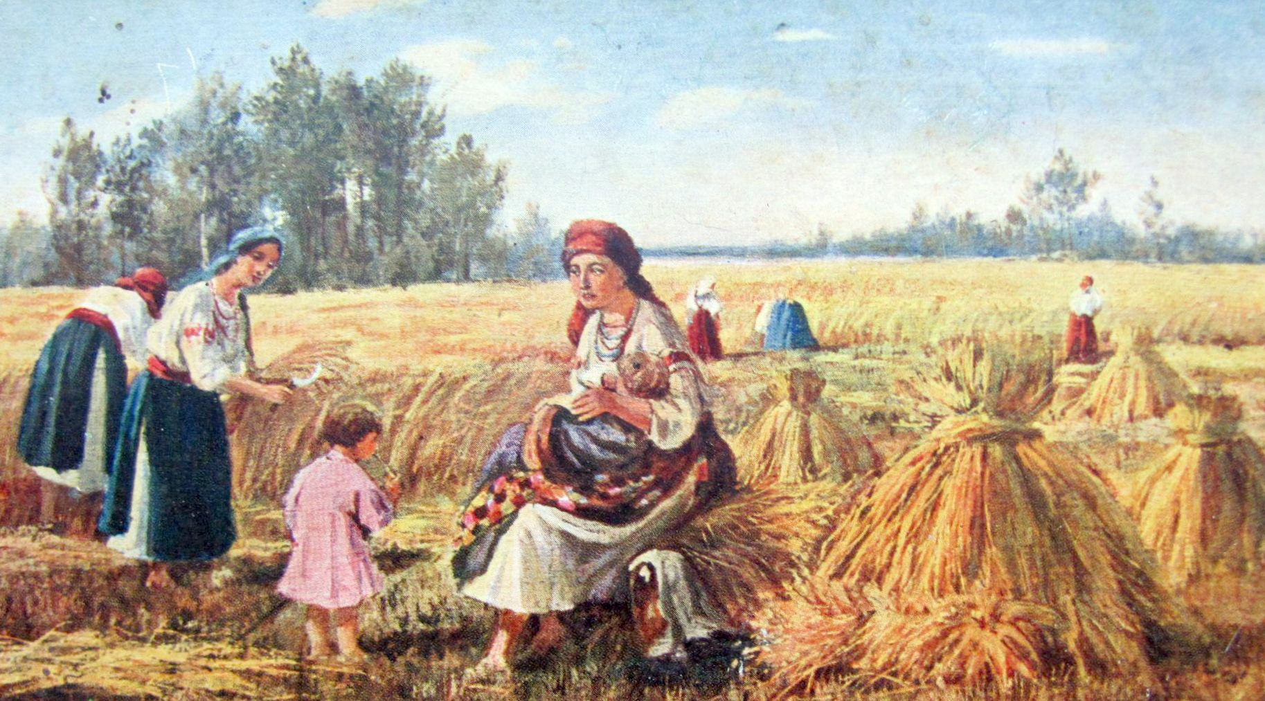 «Жатва в Курской губернии», 1910-е гг. Художник И.М. Львов Почтовая открытка.